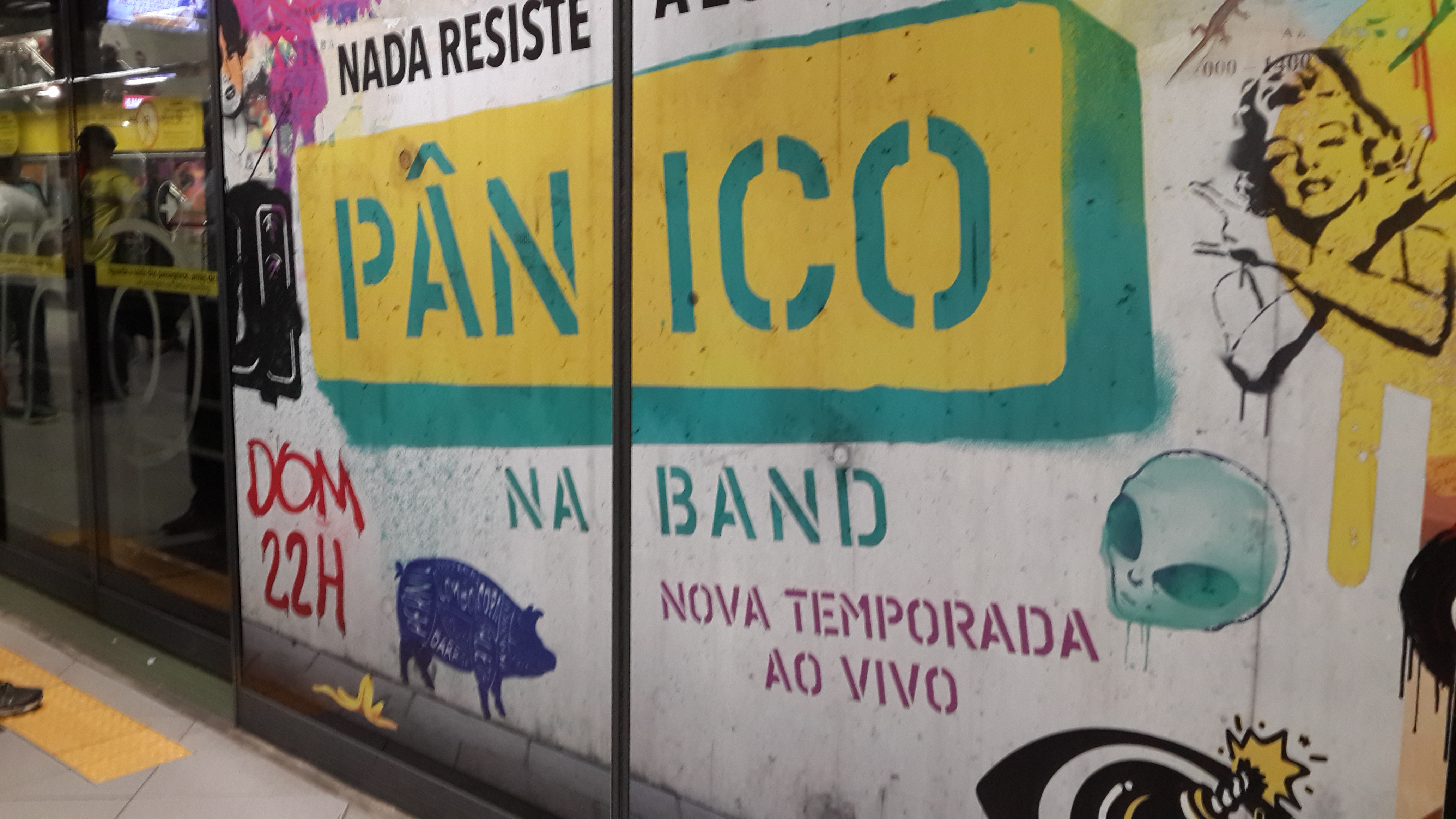 Anúncio da nova temporada de 2017 do Pânico na Band na estação Paulista da Linha 4 Amarela do Metrô de São Paulo.